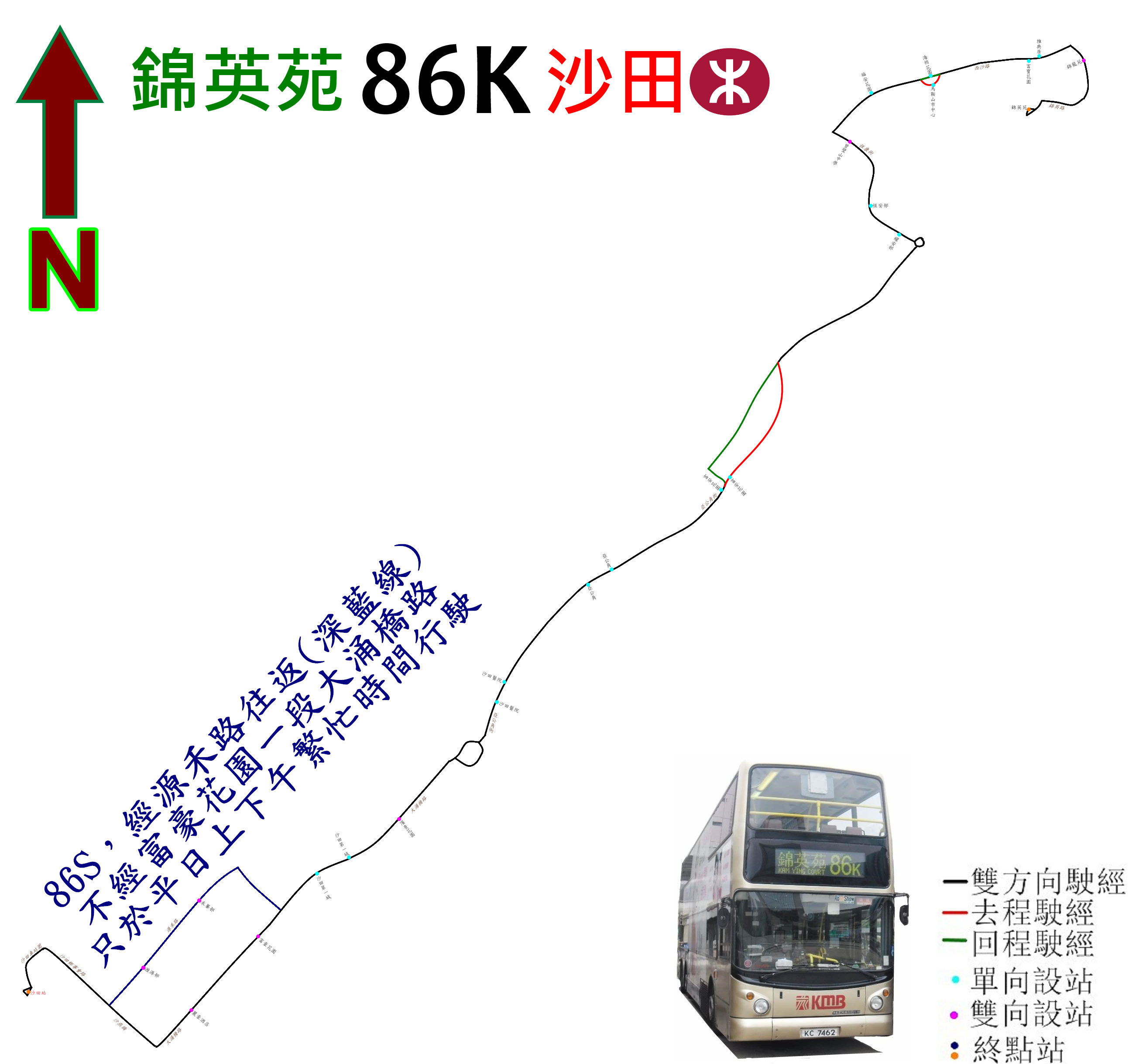 中文（香港）: 九巴86K線的走線圖